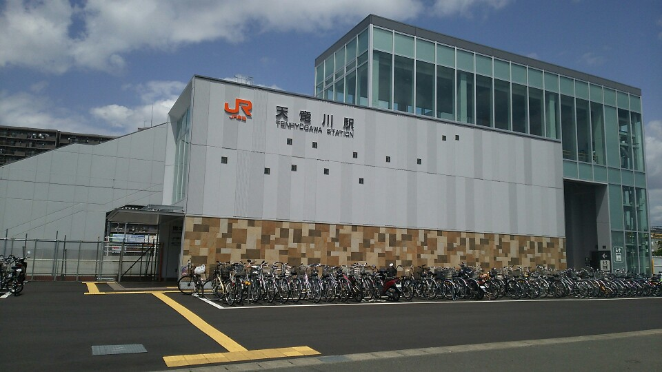 JR東海の天竜川駅の南口の駅舎です